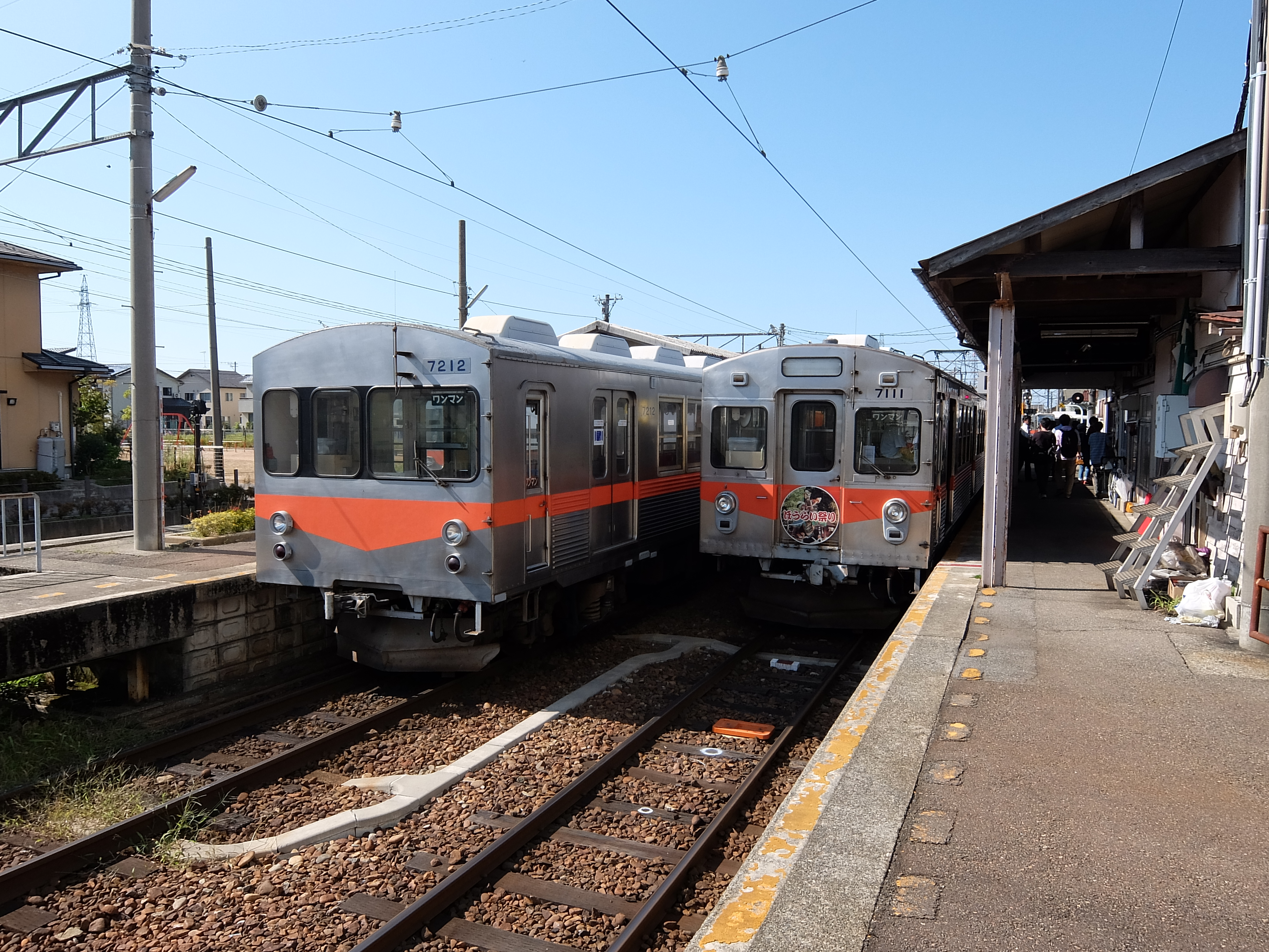 北陸鉄道 鶴来駅 7100系と7200系